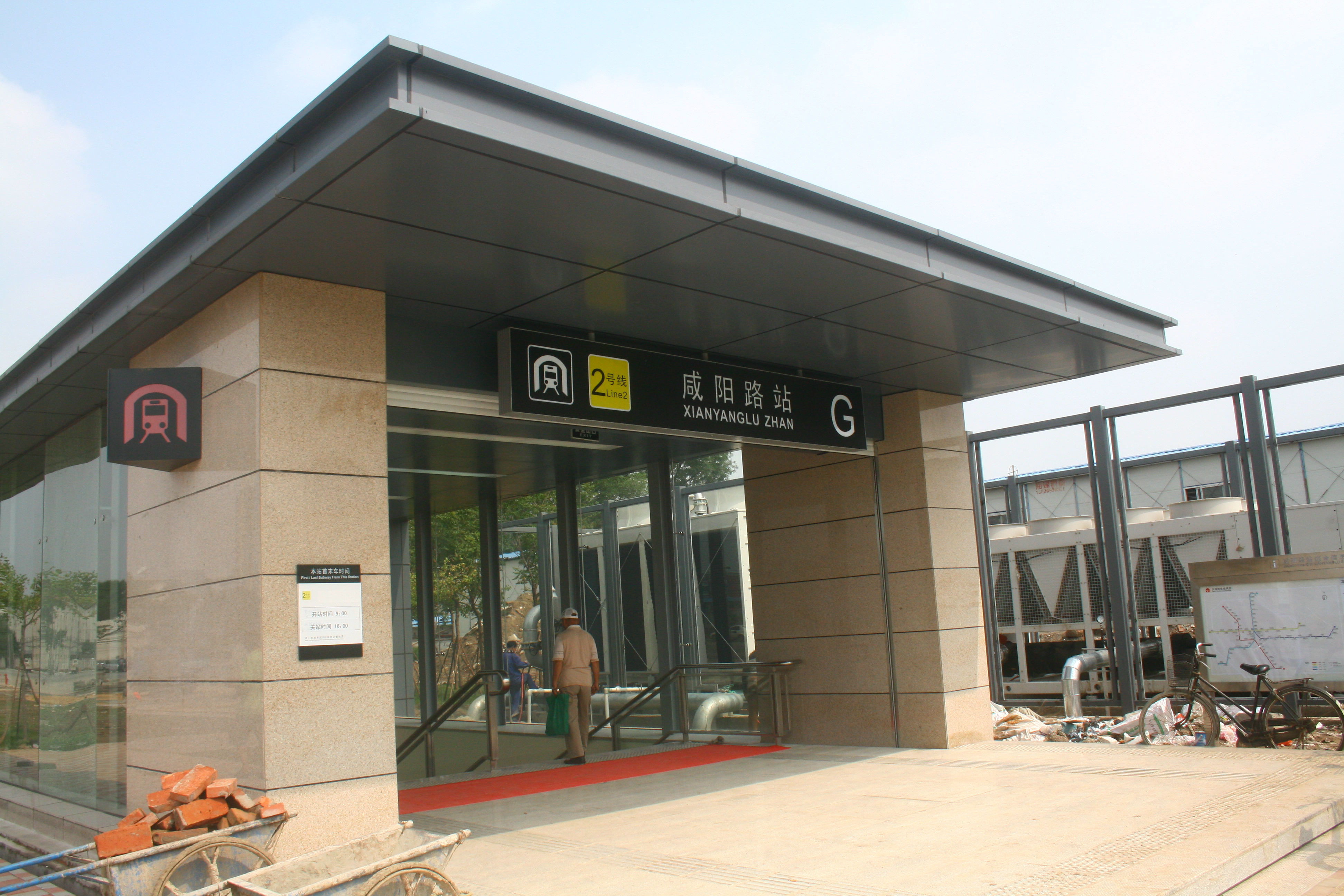 咸陽路站G出口